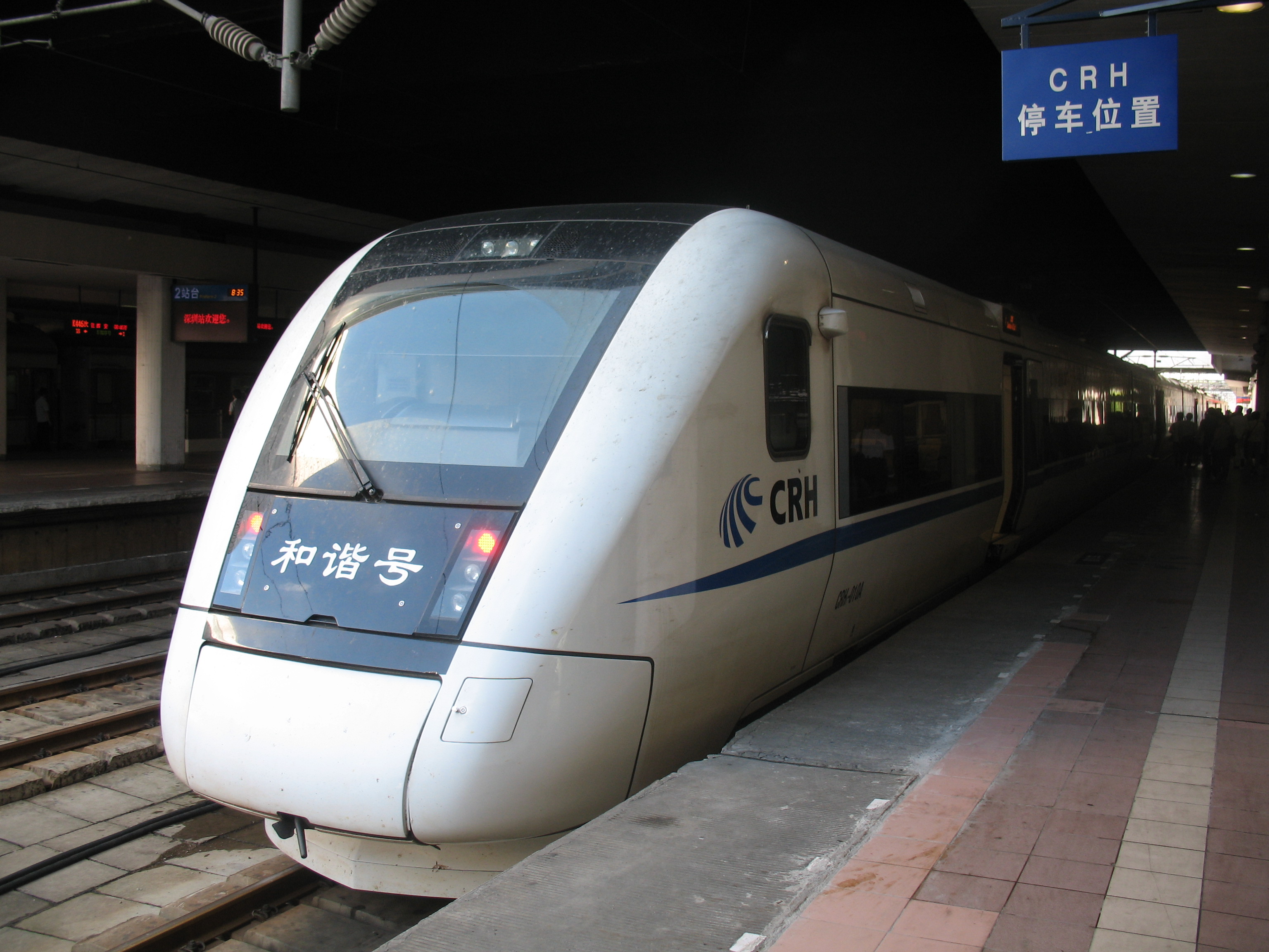 CRH1A EMU @ Shenzhen Station